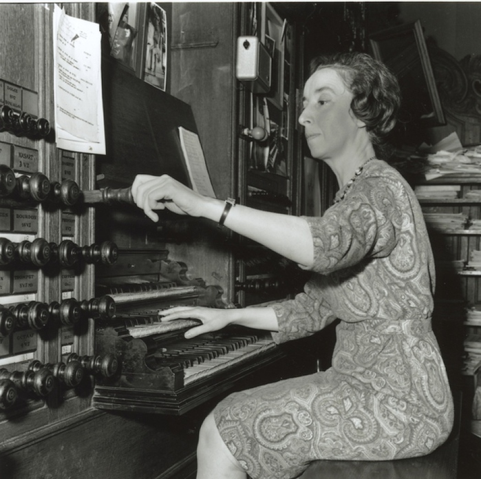 Demessieux, posiblemente en el órgano de Batz en The Hague (Evangelisch Lutherse Kerk). 1966-1967 posiblemente en Holanda.